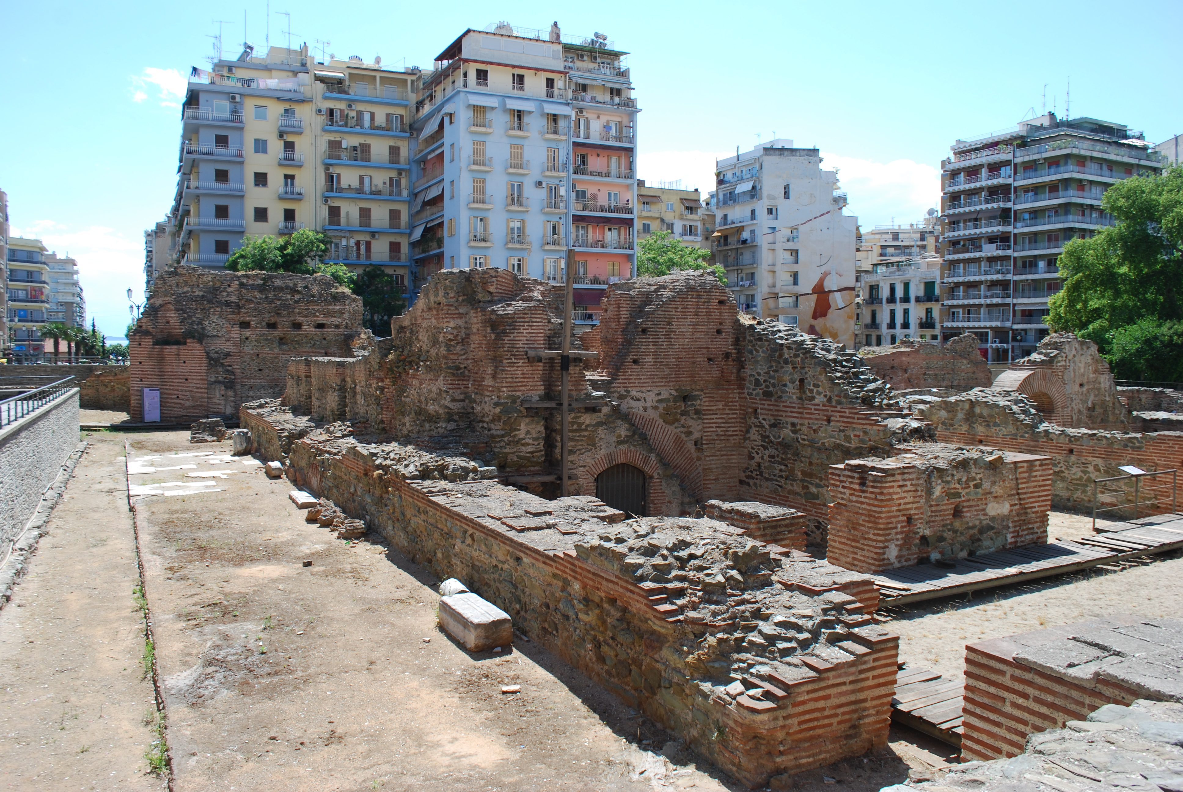 Vue de Thessalonique.